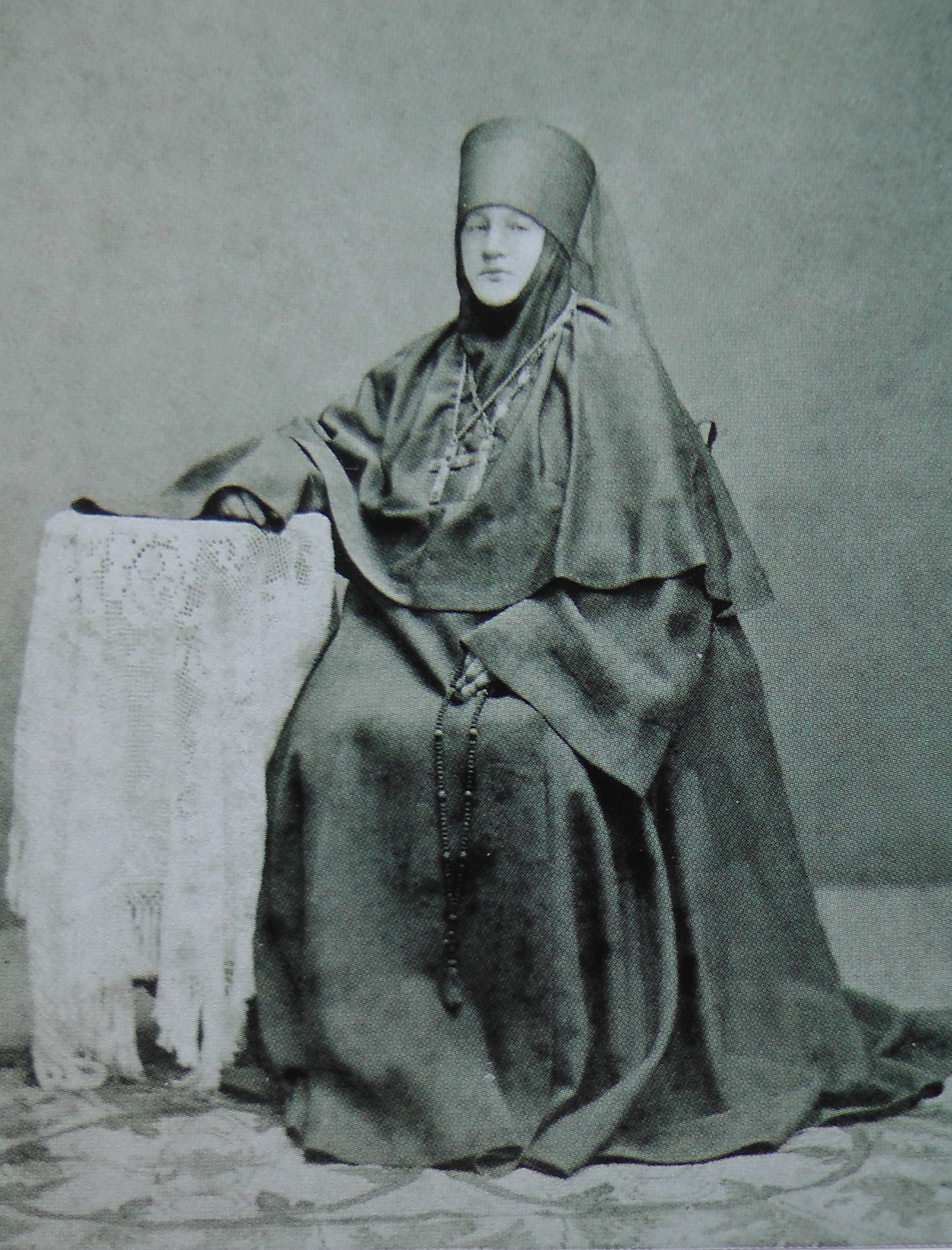 Неизвестный фотограф. Игумения Серафимова Дивеевского во имя Святой Троицы женского монастыря Мария (Ушакова)